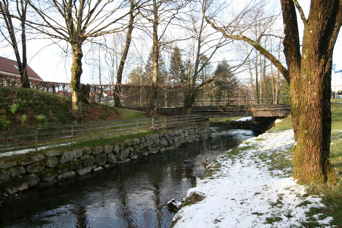 Storåna (Sandnes)